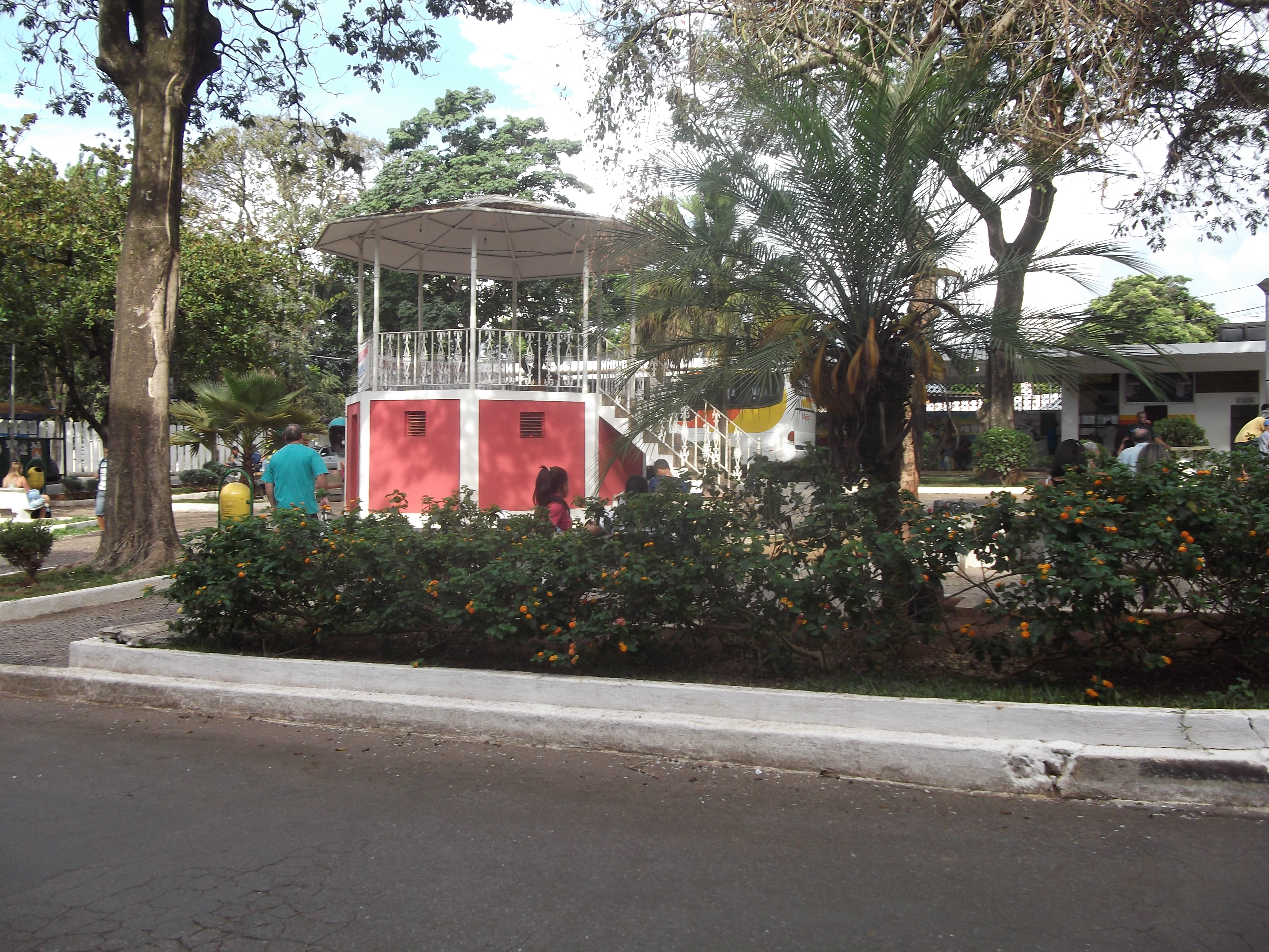 Praça Paulo Alves Moreira, Brumadinho, Brasil